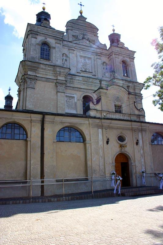 Opole Lubelski in Poland